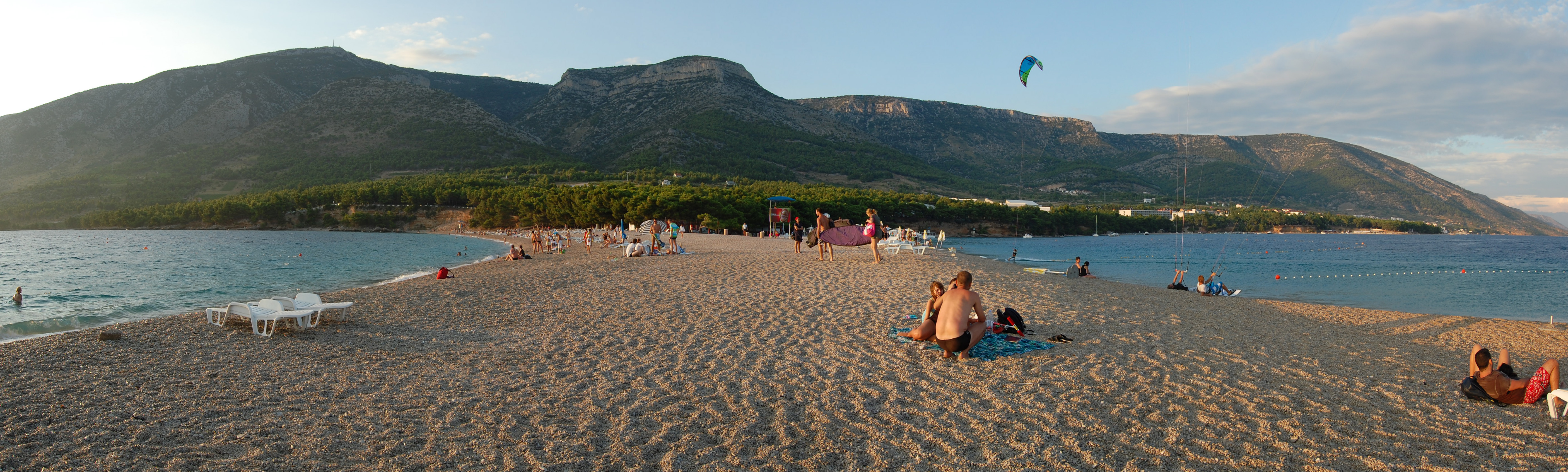 Veduta della spiaggia di Zlatni Rat al tramonto